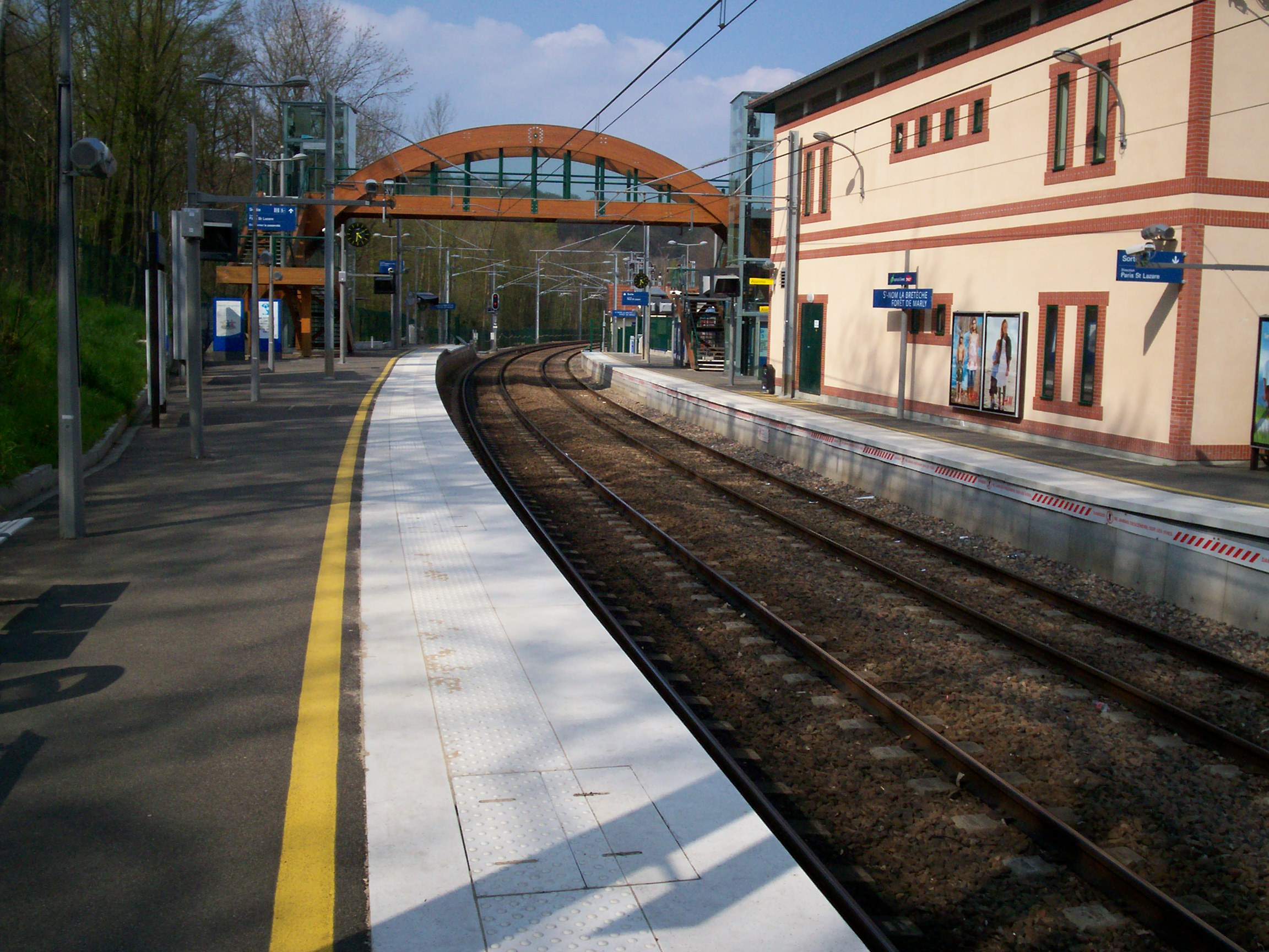 Gare de Saint-Nom GC